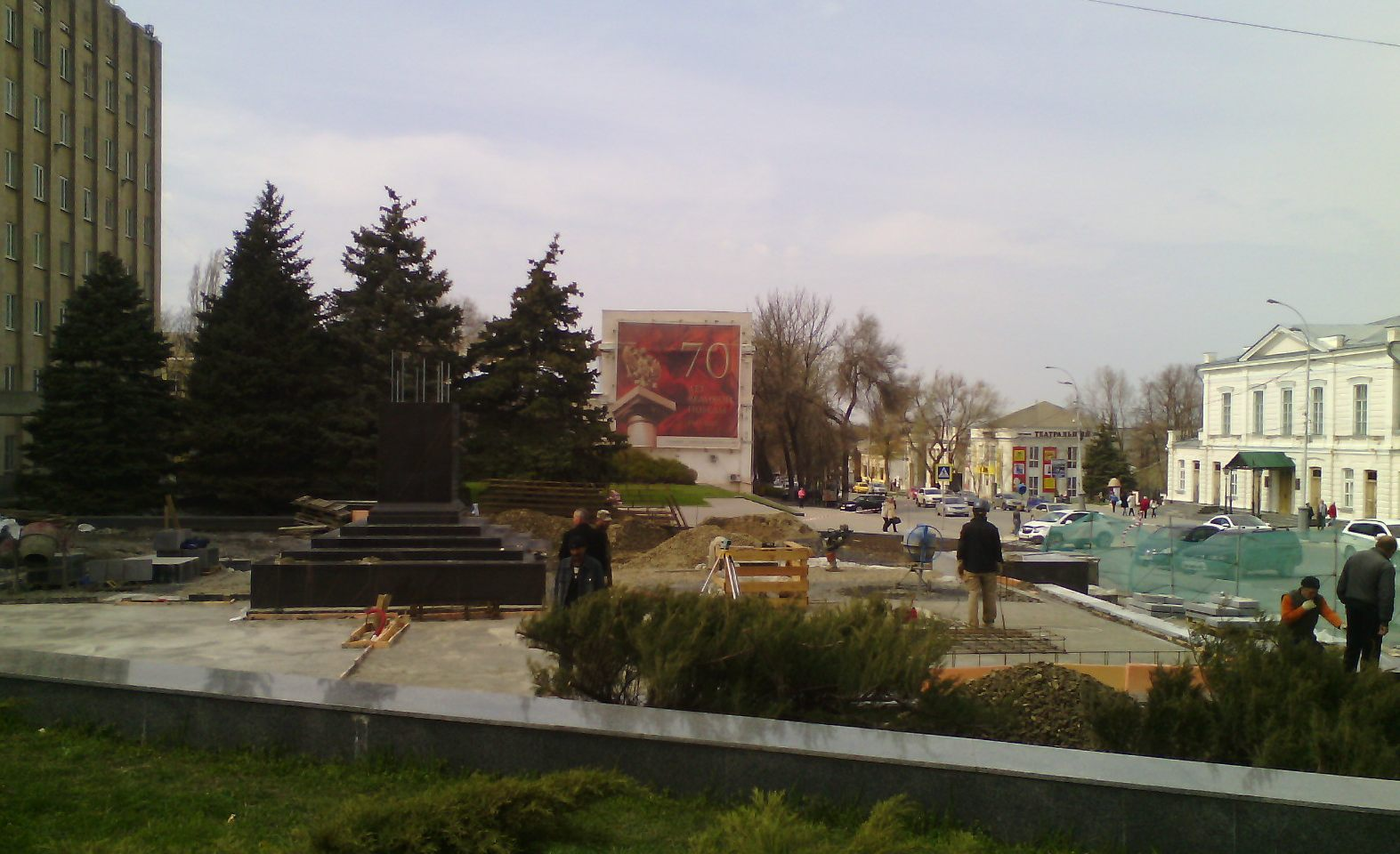 Стела «Город воинской славы», Таганрог, 2015